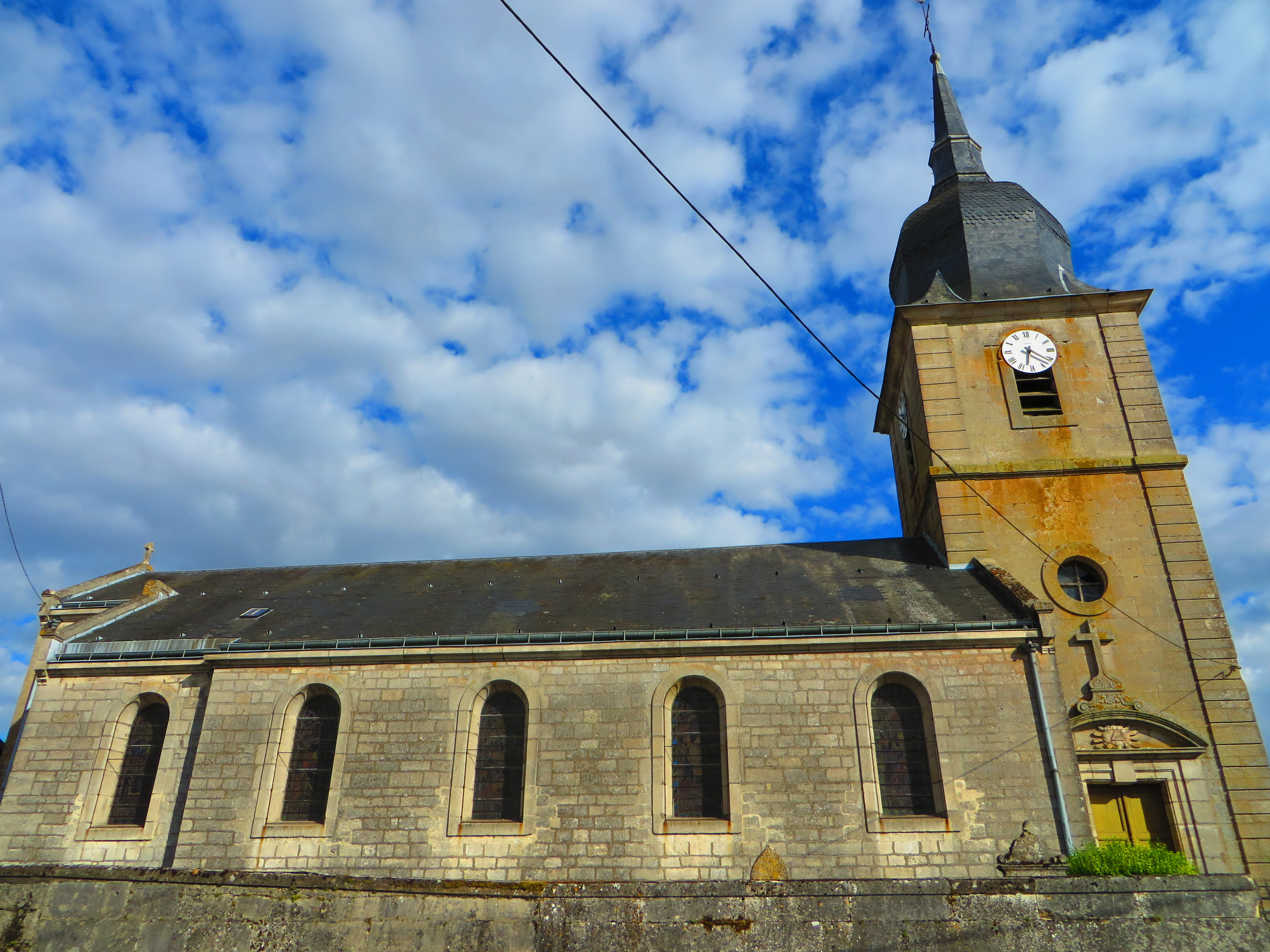 Ambly-sur-Meuse L'église Saint-Martin.